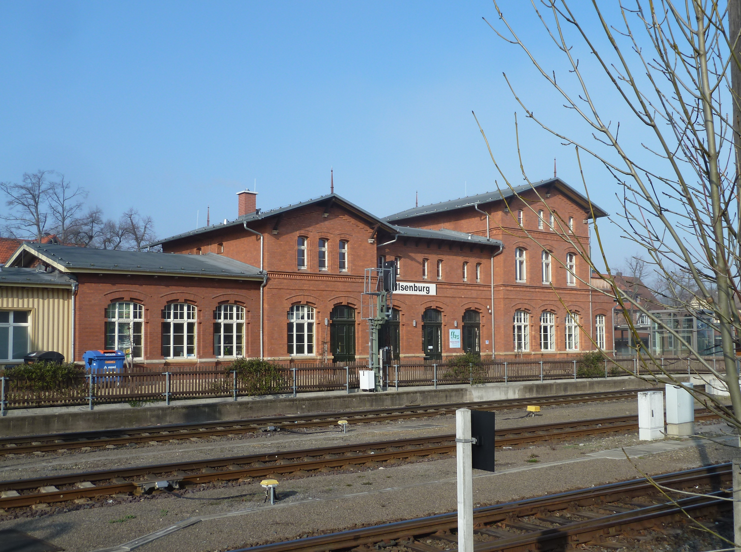 Bahnhof Ilsenburg, Empfangsgebäude, Gleisseite